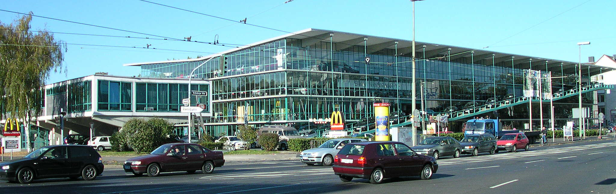 Düsseldorf, Flingern Nord, Grafenberger Allee 258, Haniel-Parkhaus mit Tankstelle und Auto-Werkstatt von Paul Schneider-Esleben 1950 - 1953 Gesamtplanungs- und Bauzeit 1985 unter Denkmalschutz gestellt 1994 Renovierung/Restaurierung Deutschlands erstes Parkhaus nach dem Krieg mit Platz für 700 Wagen. Die beiden außenliegenden Rampen wurden vom auskragenden Stahlbetontragwerk abgehängt und waren beheizt. Heute Gebrauchtwagenhandel der BMW-Niederlassung und McDonalds-Filiale